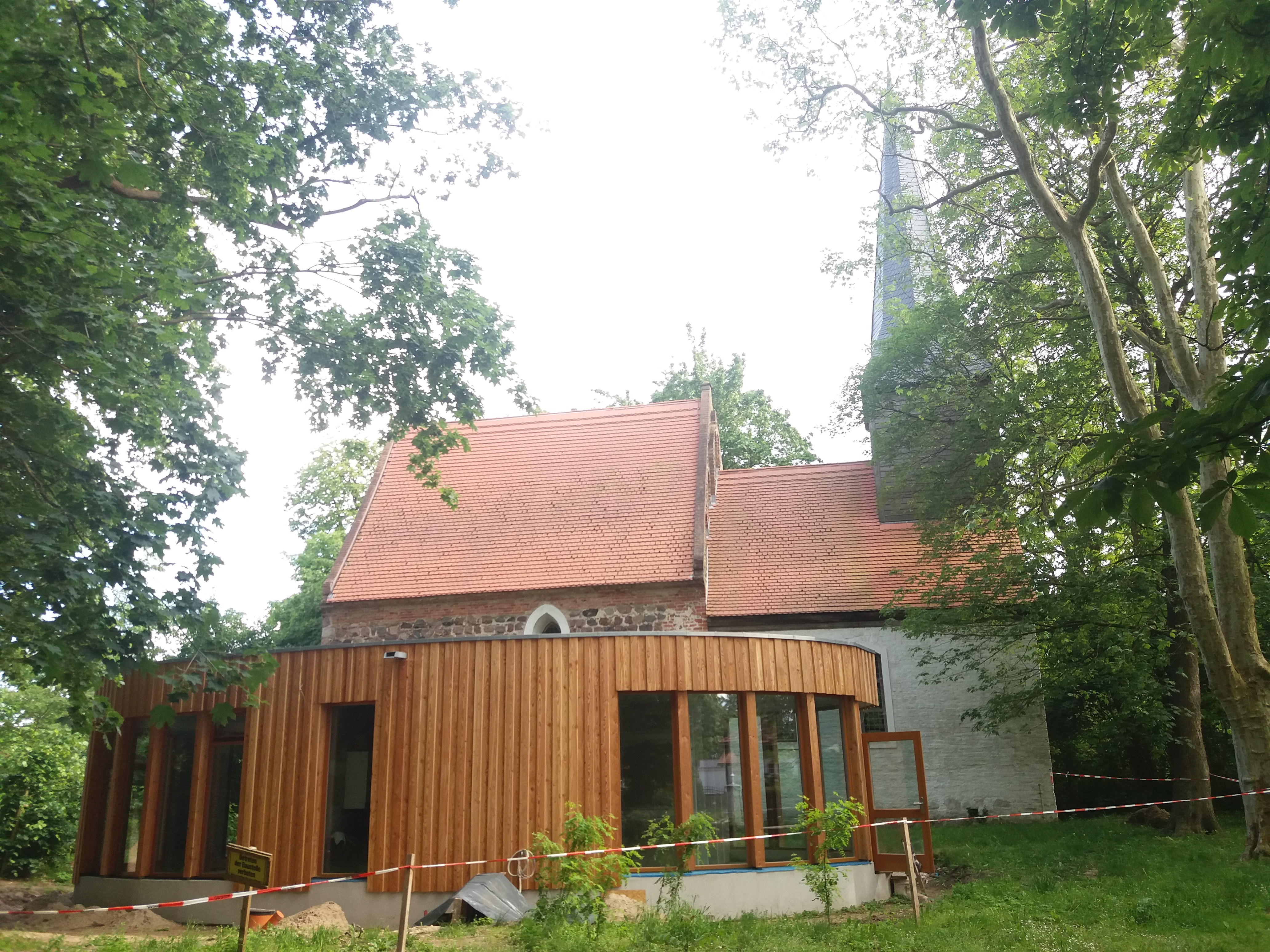 Nach dem das alte Pfarrhaus seit 2003 leerstand und verkauft worden ist, kann die Kirchengemeinde vor Ort ein neues Gemeindehaus als Dorf- und Begegnungshaus bauen. Nach den Plänen eines Berliner Architekten entsteht das 8m breite und 15m lange Gemeindehaus in Form eines Schiffes aus Glas und Holz.